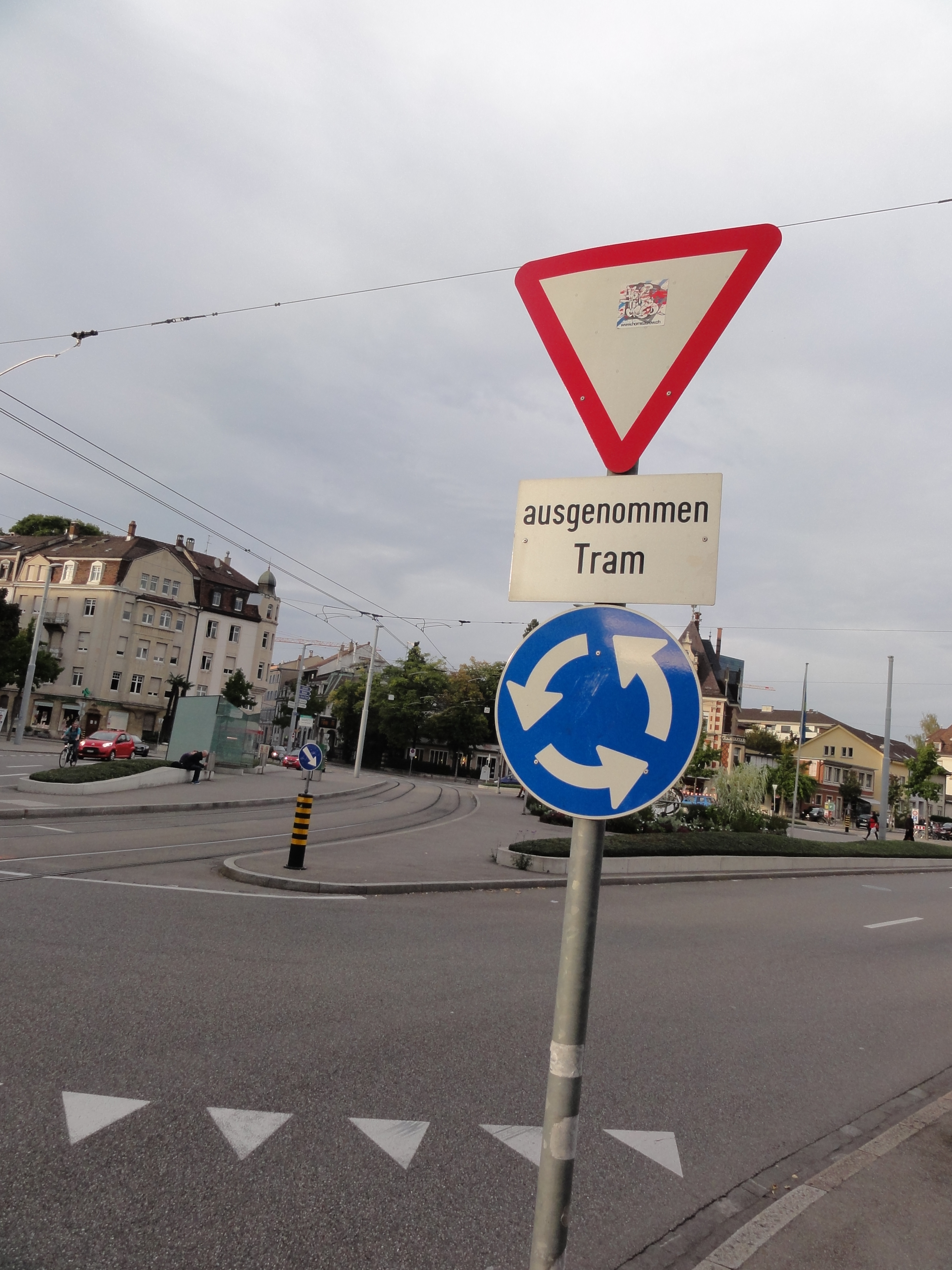 Basel — Wettsteinplatz